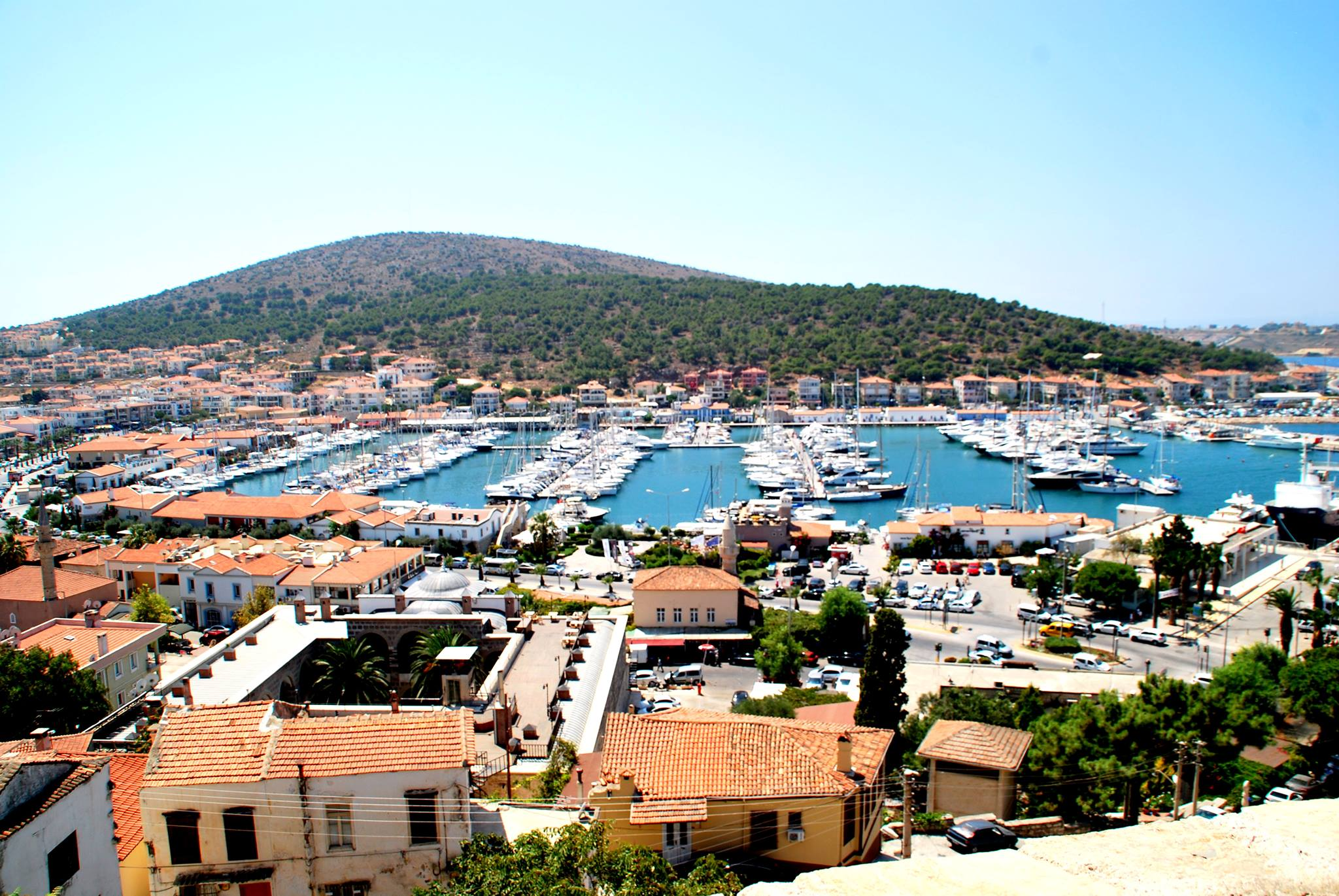 Haven Cesme